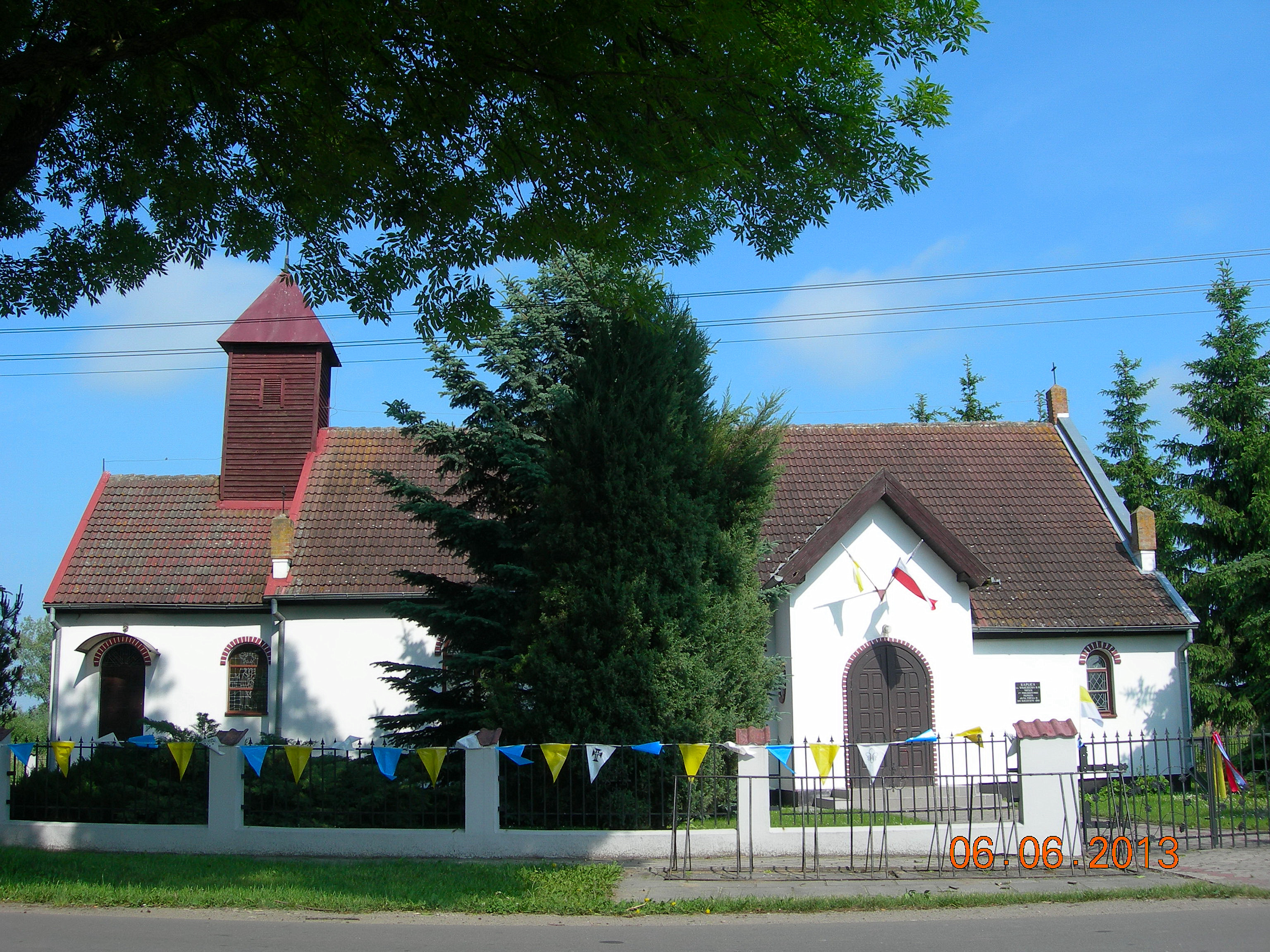 Ząbrowo - kaplica pw. św. Wojciecha.